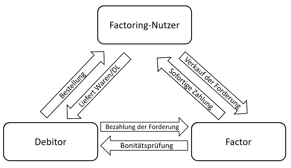 Schema Factoring